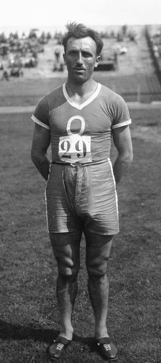 Colombes : championnat de France d'athlétisme : Degland (javelot) (portrait) : [photographie de presse] / Agence Meurisse